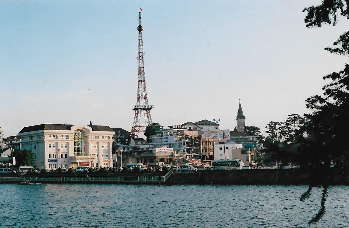 Da Lat -kaupungin Eiffel-torni vuonna 2008.